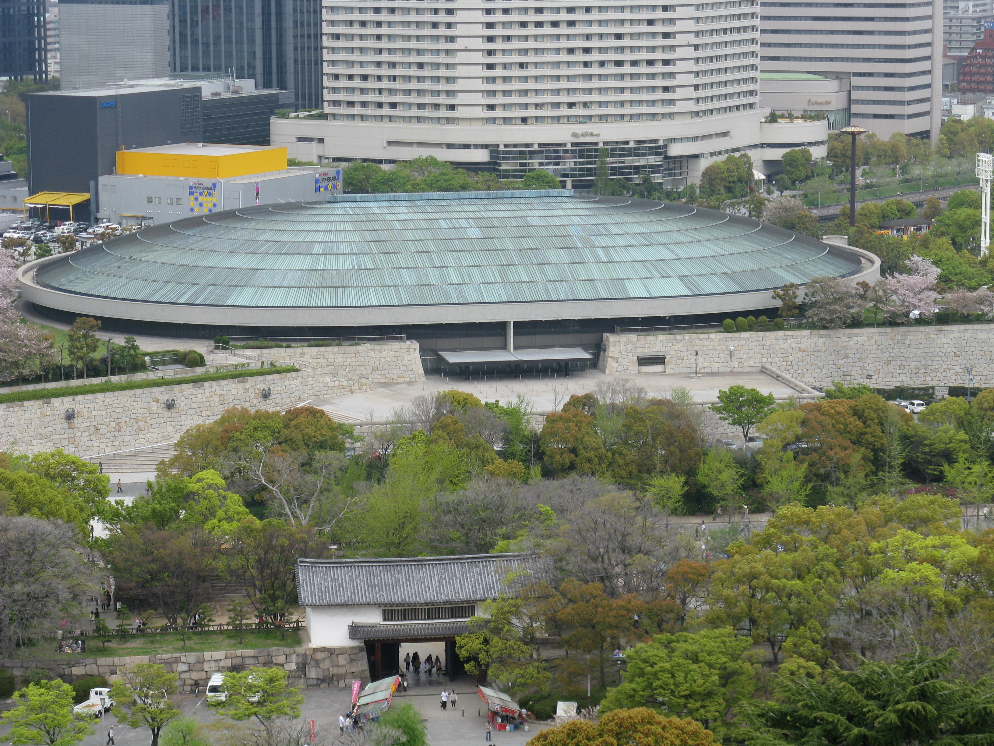 大阪城国際文化スポーツホール、大阪城ホール